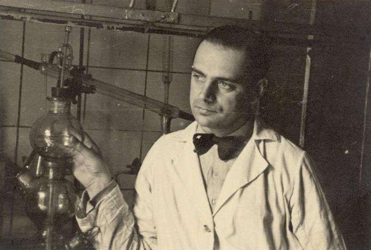 Tadeusz Pankiewicz na zapleczu swojej Apteki "Pod Orłem" okolo 1941 roku.